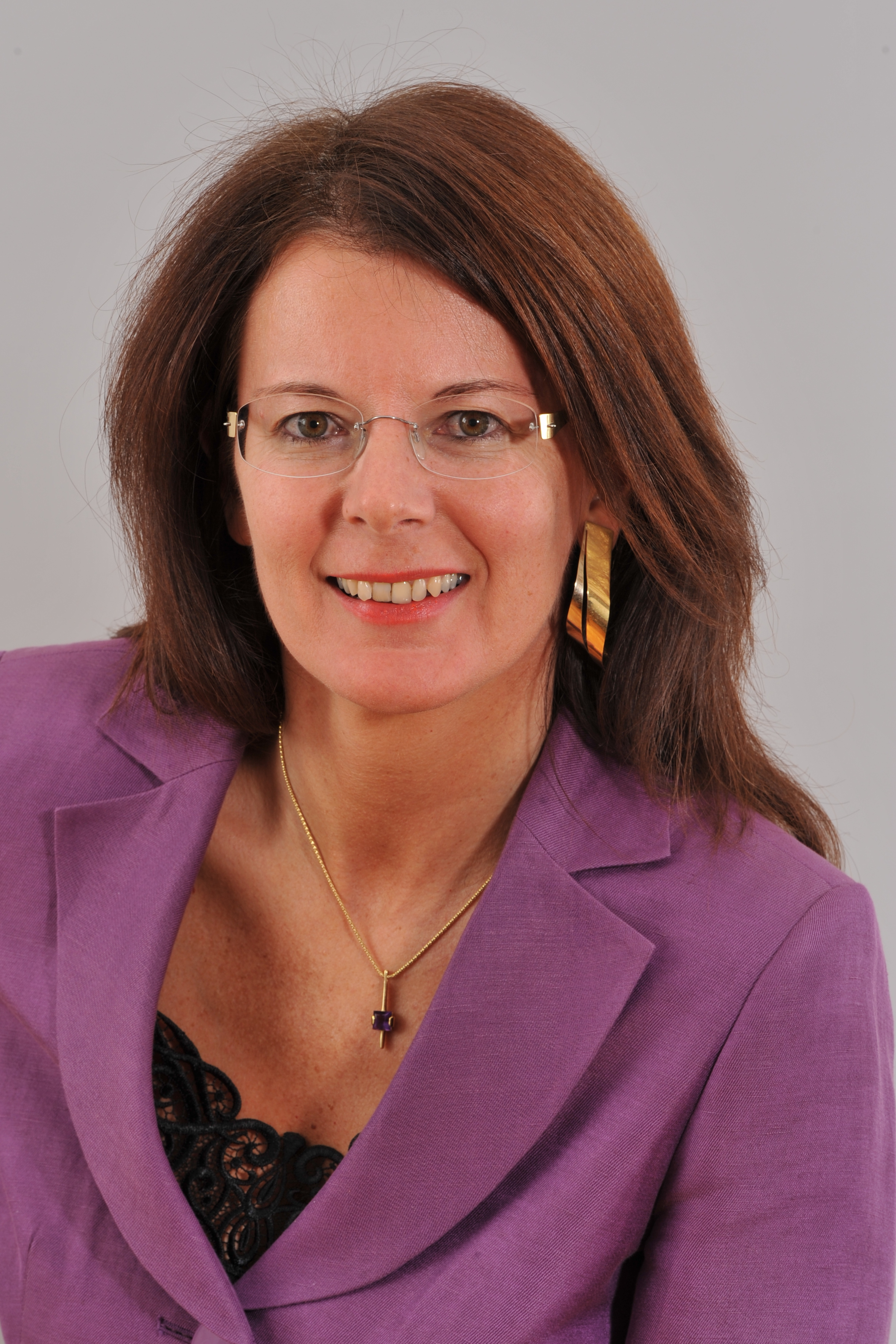 Landtagsprojekt Salzburg: Gerlinde Rogatsch